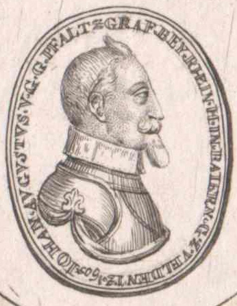 Johann August, Pfalzgraf zu Veldenz-Lützelstein, 1575-1611; Wien, Österreichische Nationalbibliothek, Bildarchiv und Grafiksammlung, Porträtsammlung, Inventar-Nr. PORT_00051546_01